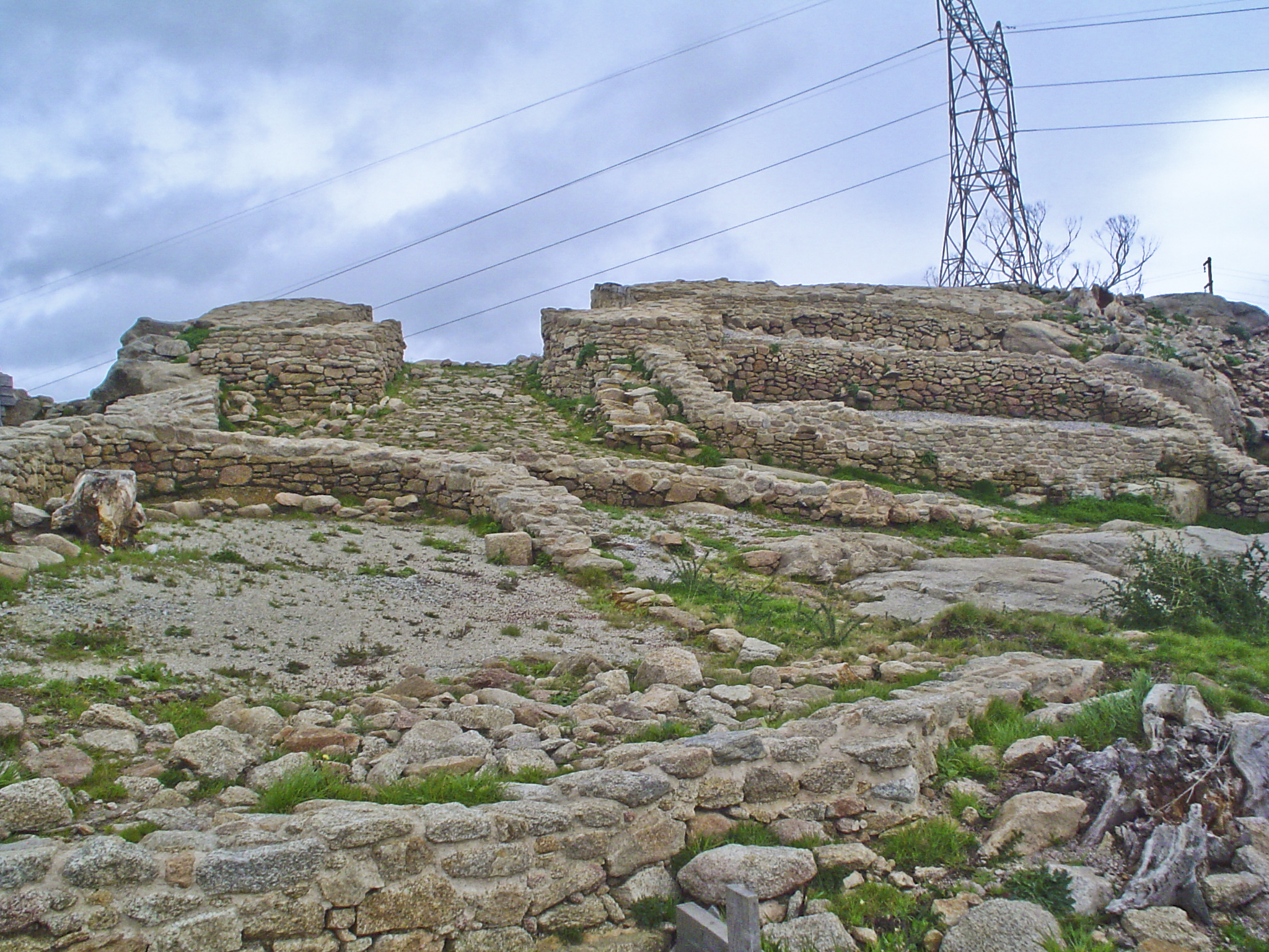 Castro de Elviña. Un dos acesos a croa excavados